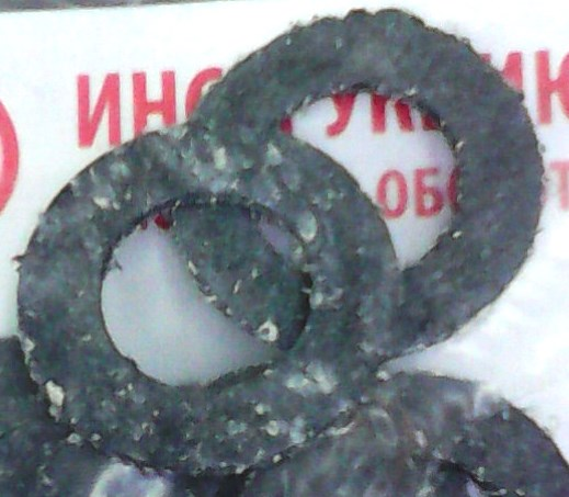 Готовые уплотнительные прокладки из паронита. Согласно данным производителя на упаковке - рассчитаны на рабочее давление до 64 бар, температуру применения от - 50 град. Цельсия до + 450 град. Цельсия, сфера применения: горячее водоснабжение, газовое оборудование, системы отопления.